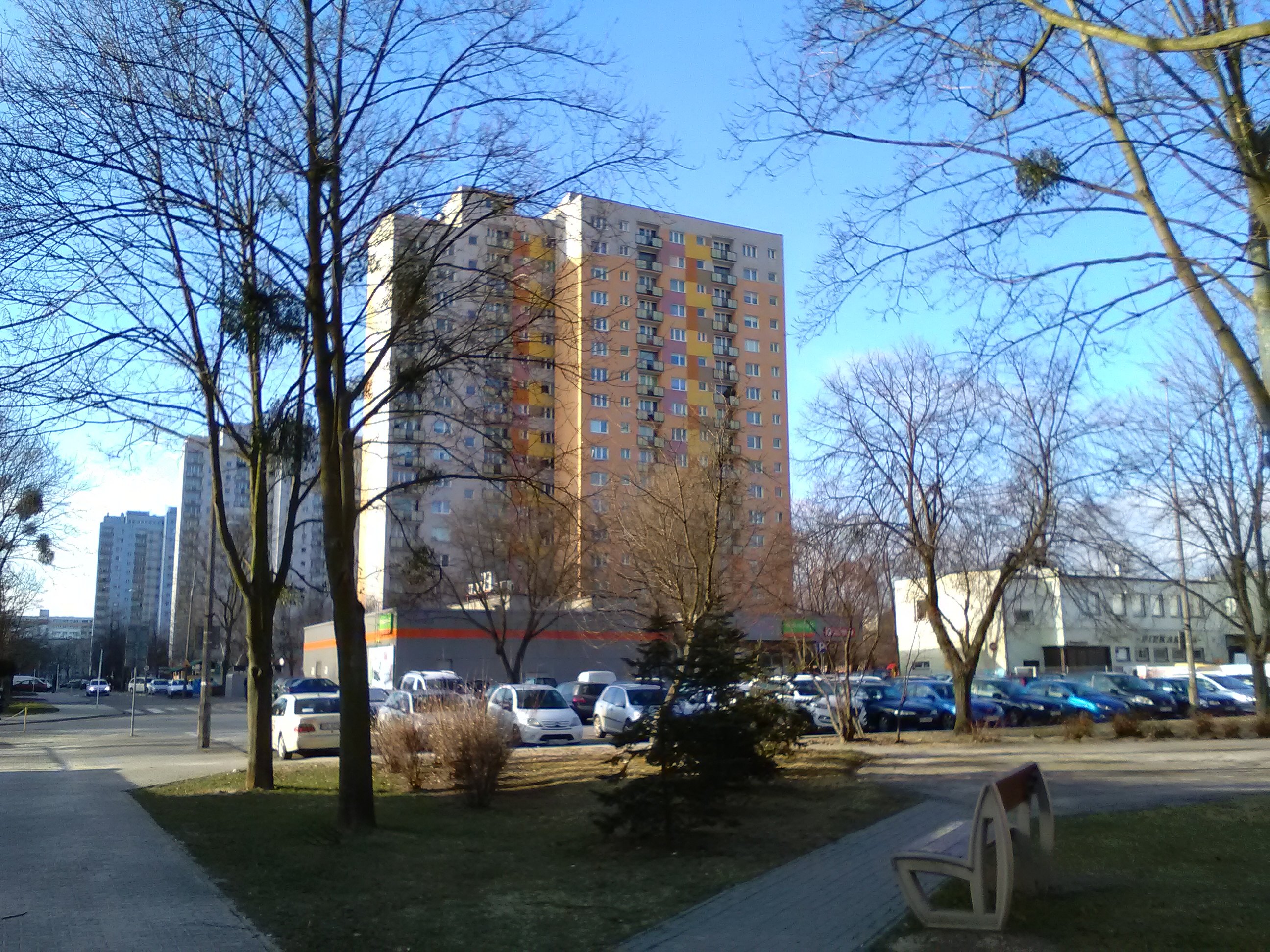 Osiedle Rzeczypospolitej w Poznaniu- widok na skrzyżowanie ulic Jastrzębia i Wyzwolenia, piekarnię, sklep stokrotka.